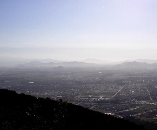 Vista de Puente Alto Norte desde el cerro de Ramón. Chile.